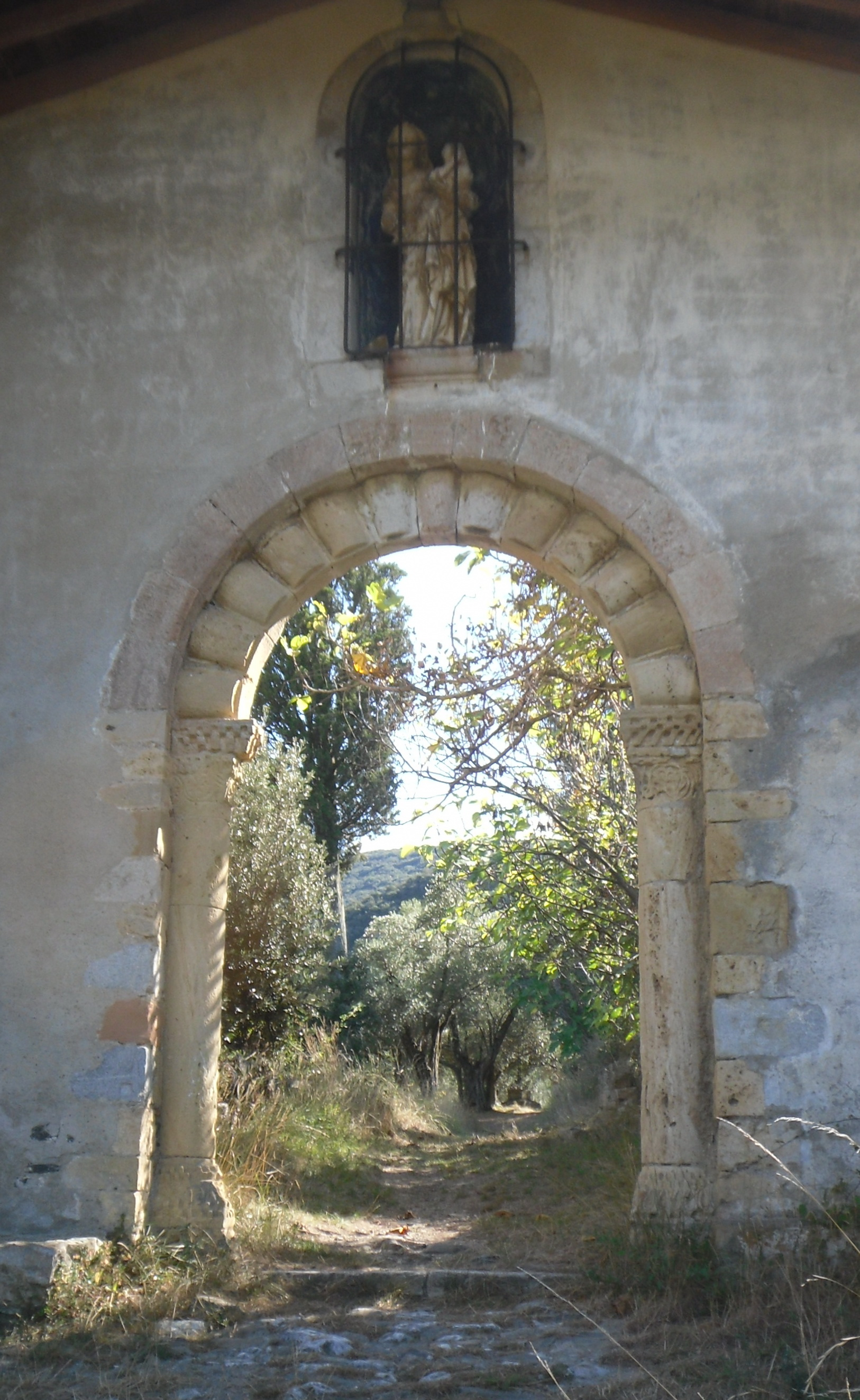 Eglise Notre-Dame-de-Laval à Caudiès-de-Fenouillèdes